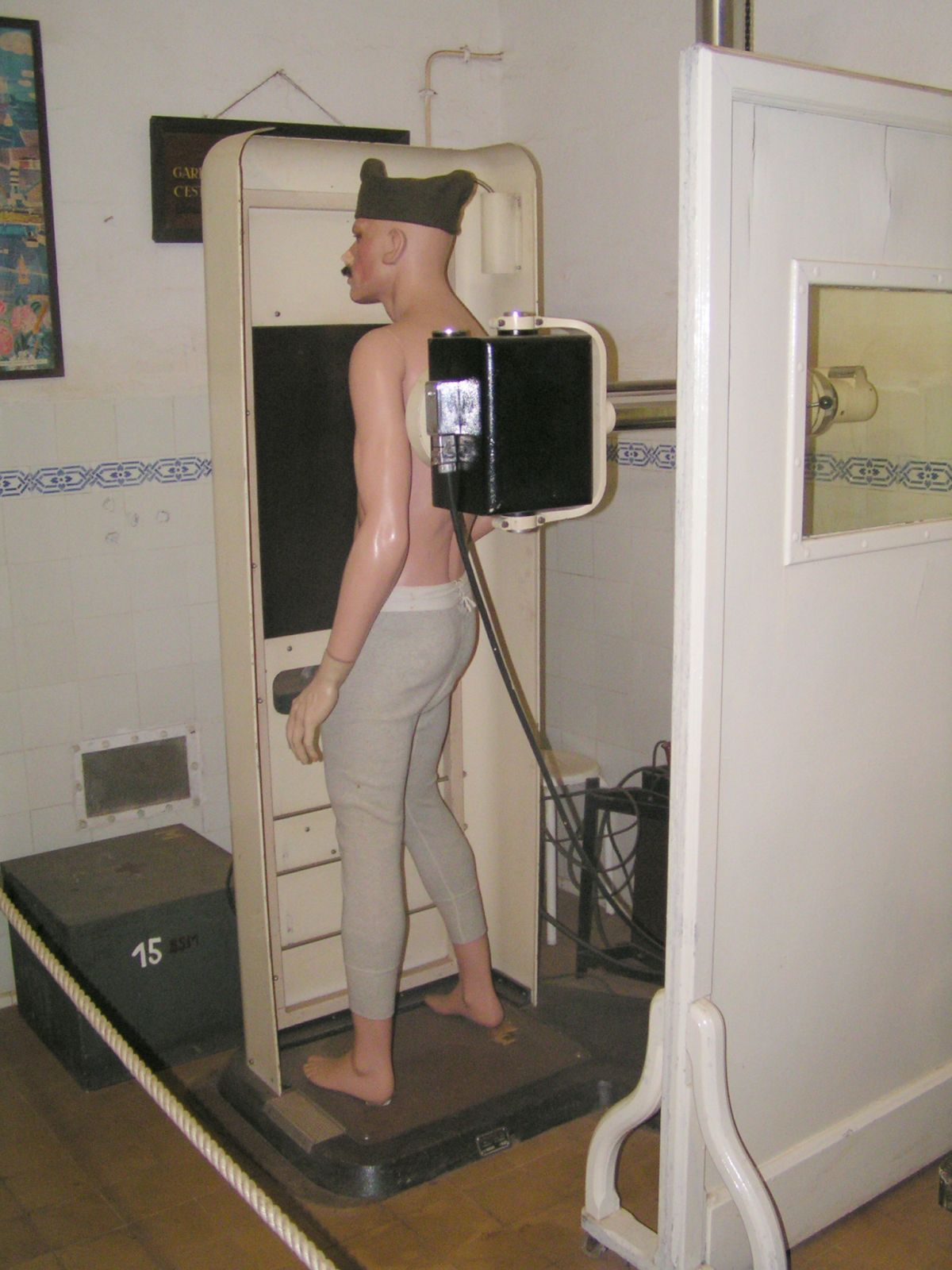 Röntgengerät historisch, fotografiert 2004 im Fort Hackenberg (Frankreich)